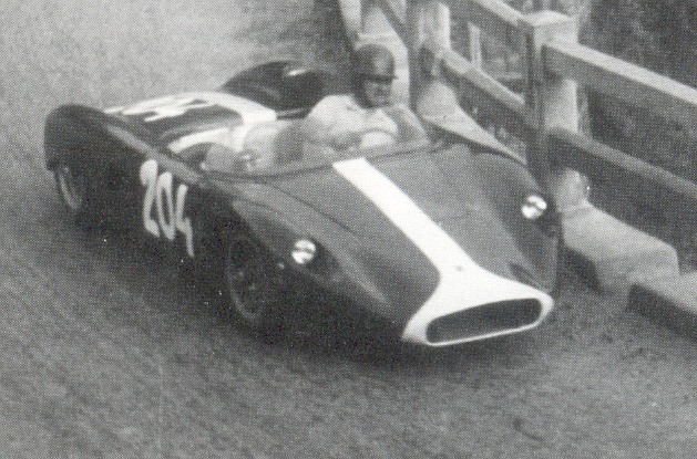 Bandini 1000 a motore posteriore. Ilario Bandini foto del 1962, tratta dal libro: Bandini (storia della vita e automobili di Ilario Bandini)